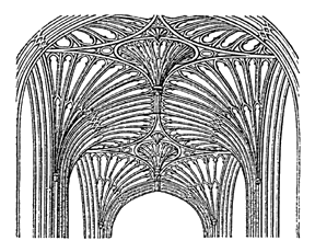 Trichtergewölbe.